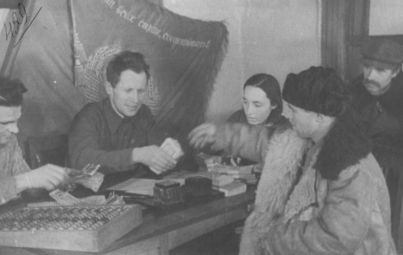 Lohnzahlung in einem Kolchos (Artel) um 1940